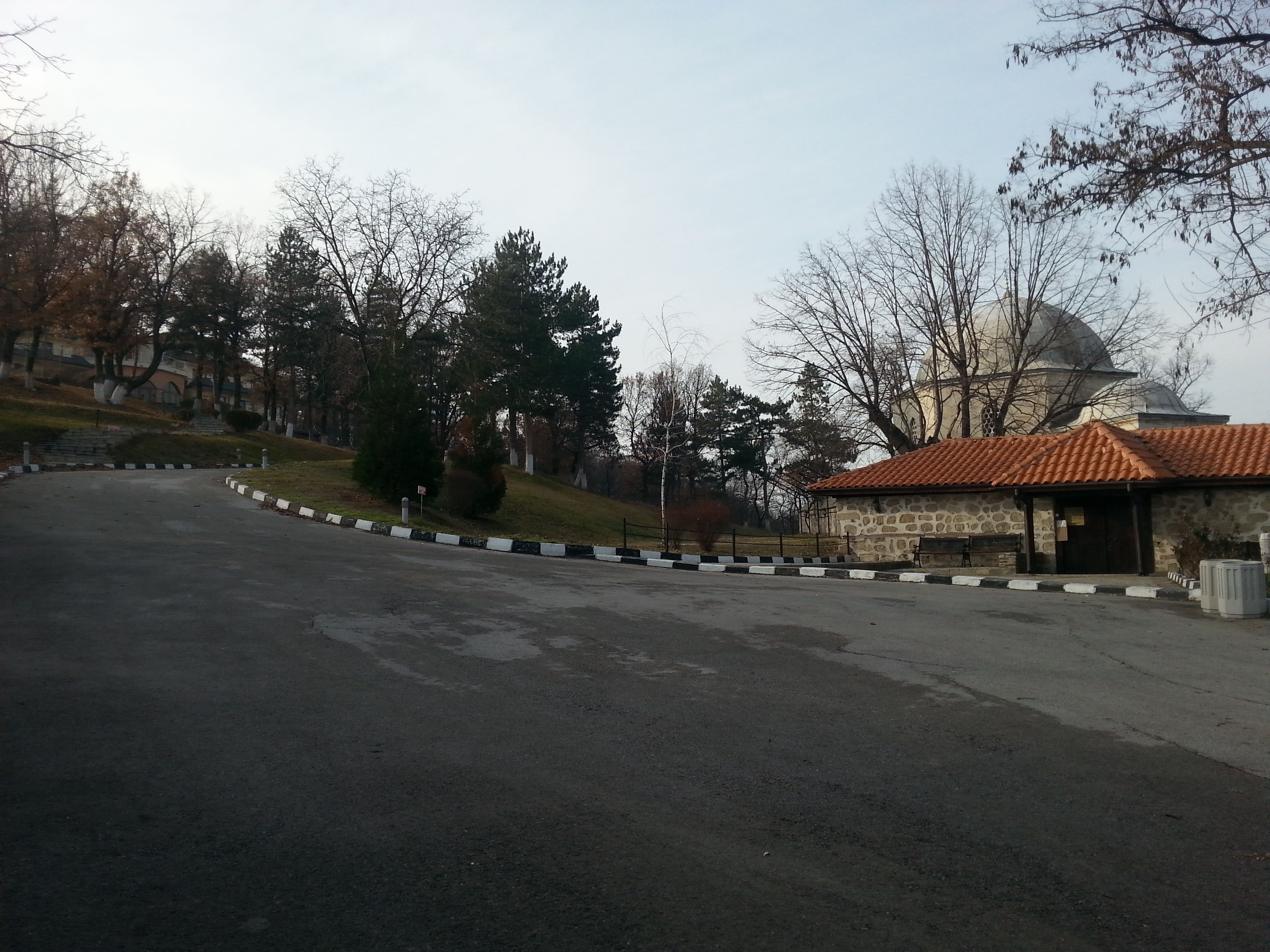 Тюрбето на Осман баба отзад с входа на текето отпред и хотел „Джем“ отляво над пътя